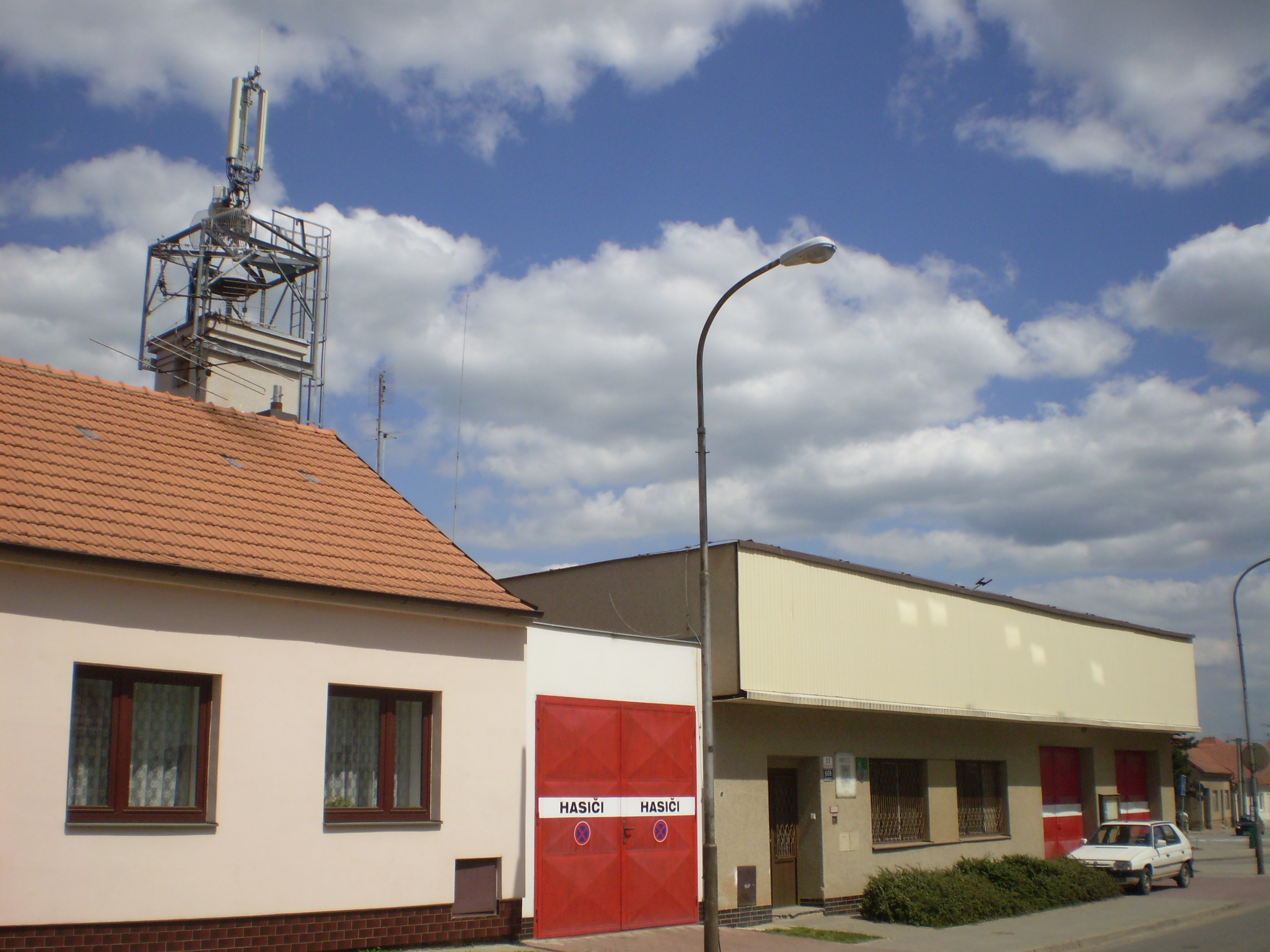 Brno-Žebětín. Místní hasičárna.